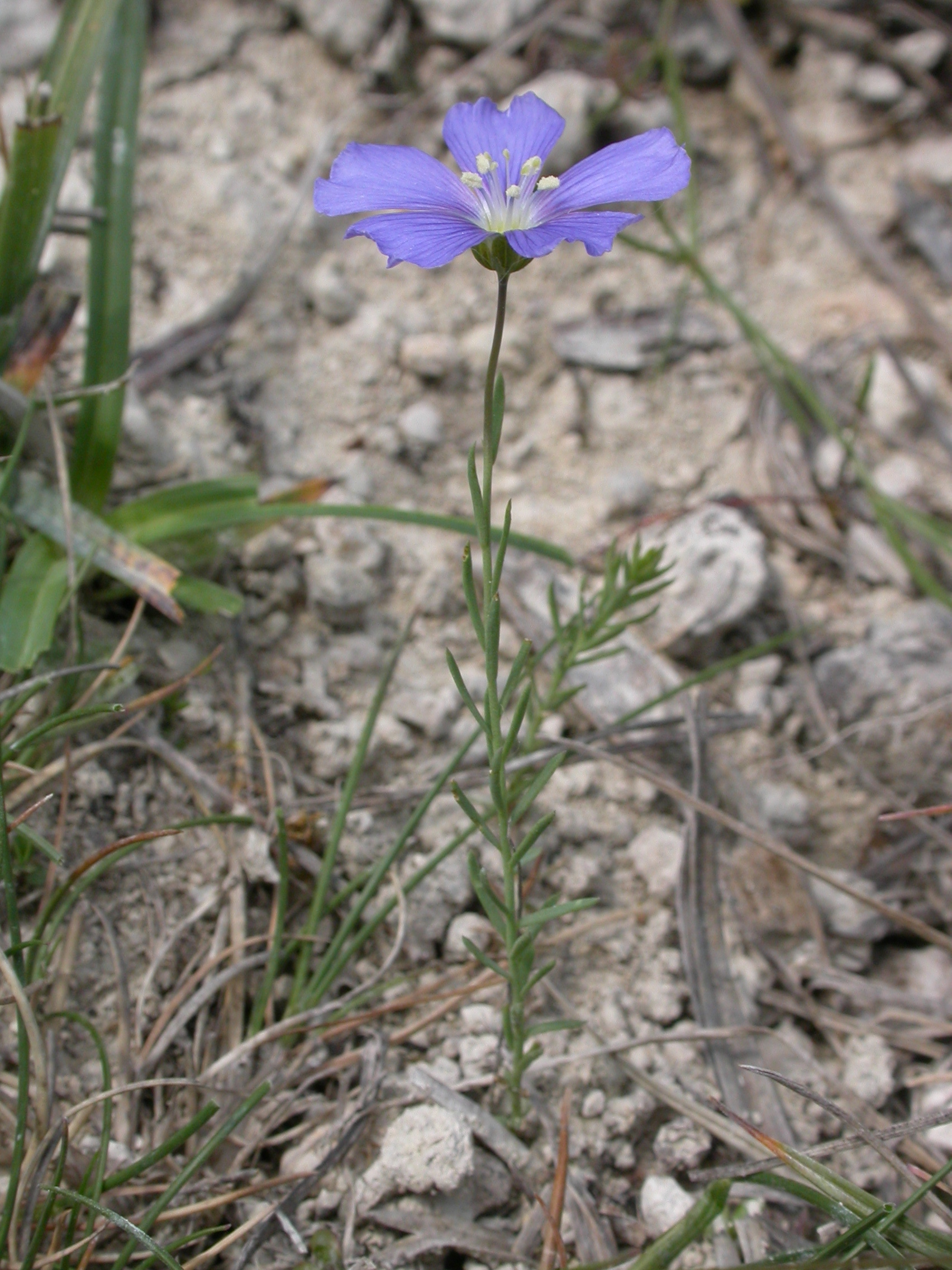 Linum leonii Coteau de Chézy-sur-Marne (Aisne), France